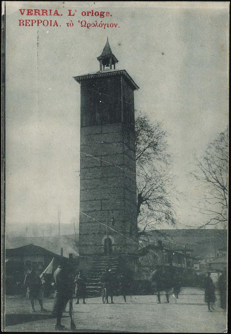 Часовниковата кула в Бер